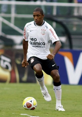 Jucilei em ação no Corinthians em 2010